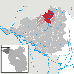 Putlitz in Brandenburg (Country) - District Prignitz